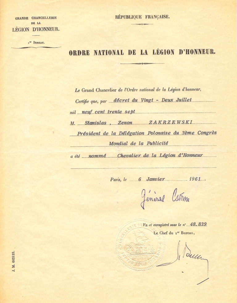 Potwierdzenie nadania Francuskiej Legii Honorowej, wydane w 1961 r.